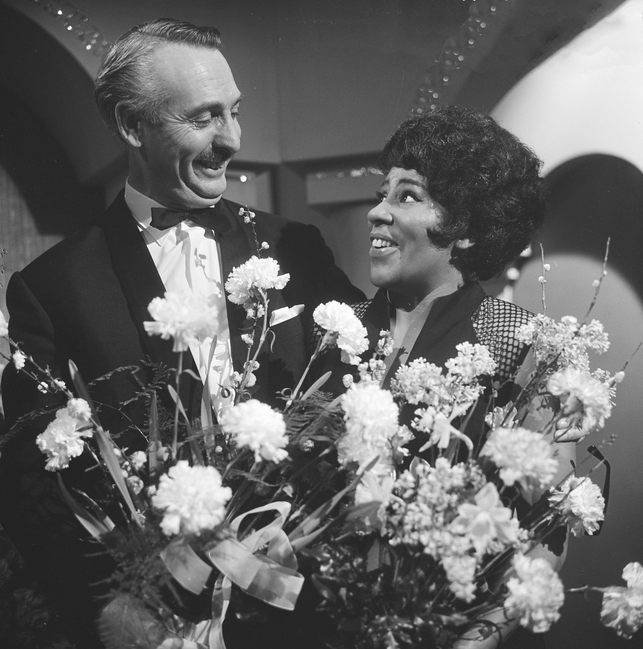 Collectie / Archief : Fotocollectie Anefo Reportage / Serie : [ onbekend ] Beschrijving : Nationaal Songfestival 1966. Winnares Milly Scott en dirigent Dolf van der Linden Datum : 5 februari 1966 Trefwoorden : artiesten, dirigenten, muziek, songfestivals, zangeressen Persoonsnaam : Linden, Dolf van der, Scott, Milly Instellingsnaam : Nationaal Songfestival Fotograaf : Koch, Eric / Anefo Auteursrechthebbende : Nationaal Archief Materiaalsoort : Negatief (zwart/wit) Nummer archiefinventaris : bekijk toegang 2.24.01.03 Bestanddeelnummer : 918-7507